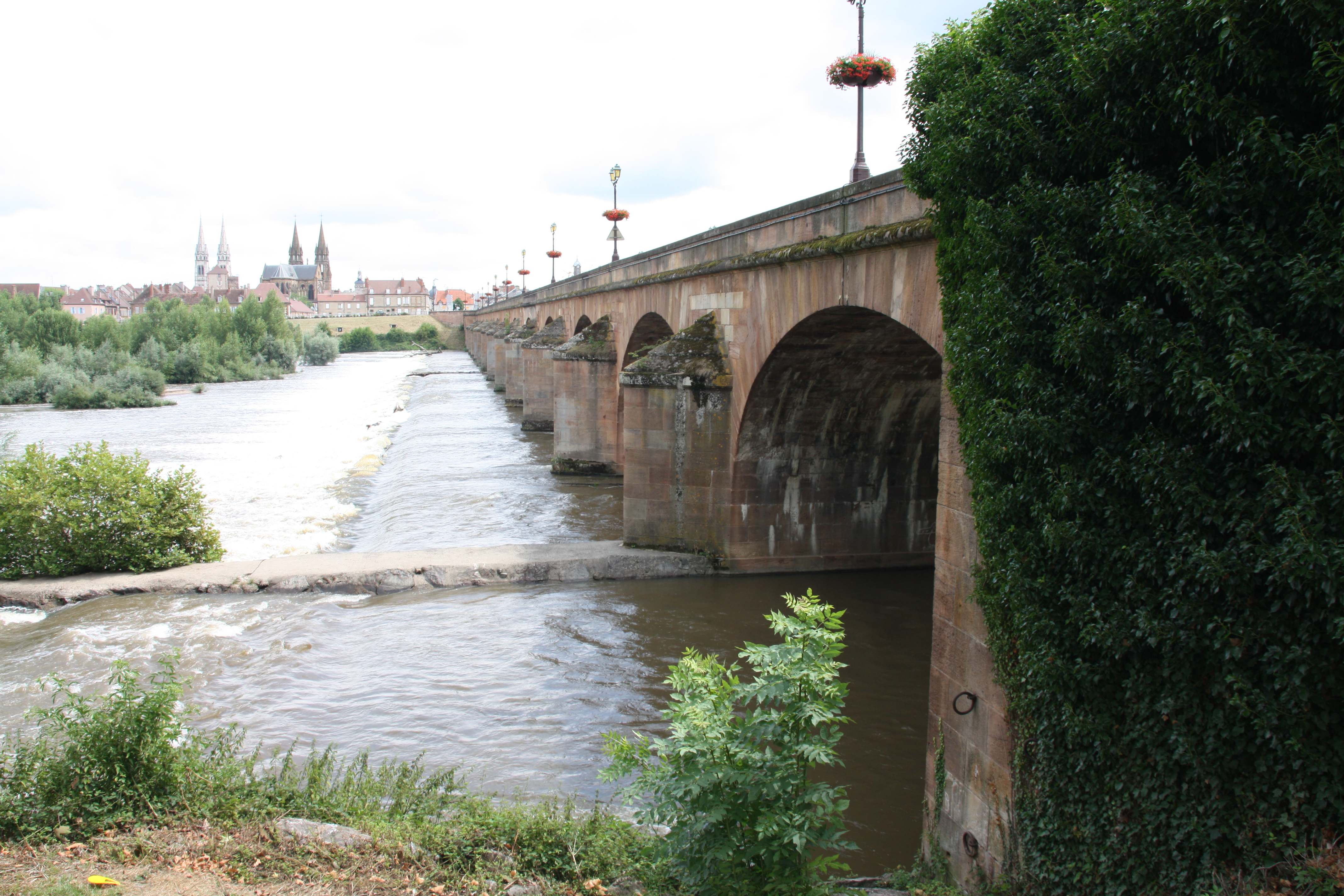 Le Pont Régemortes à Moulins, France.